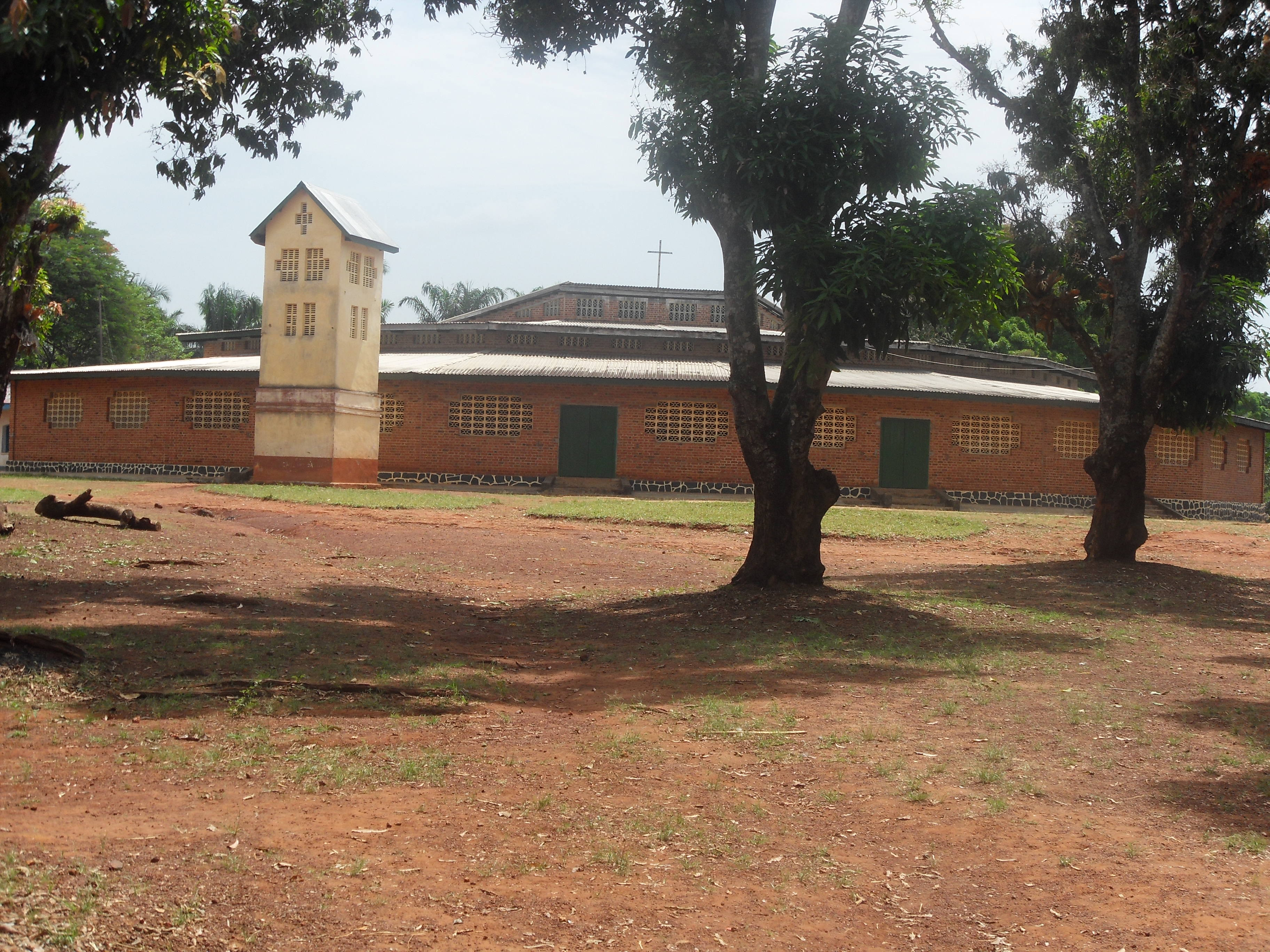 Nouvelle église catholique d'Aba